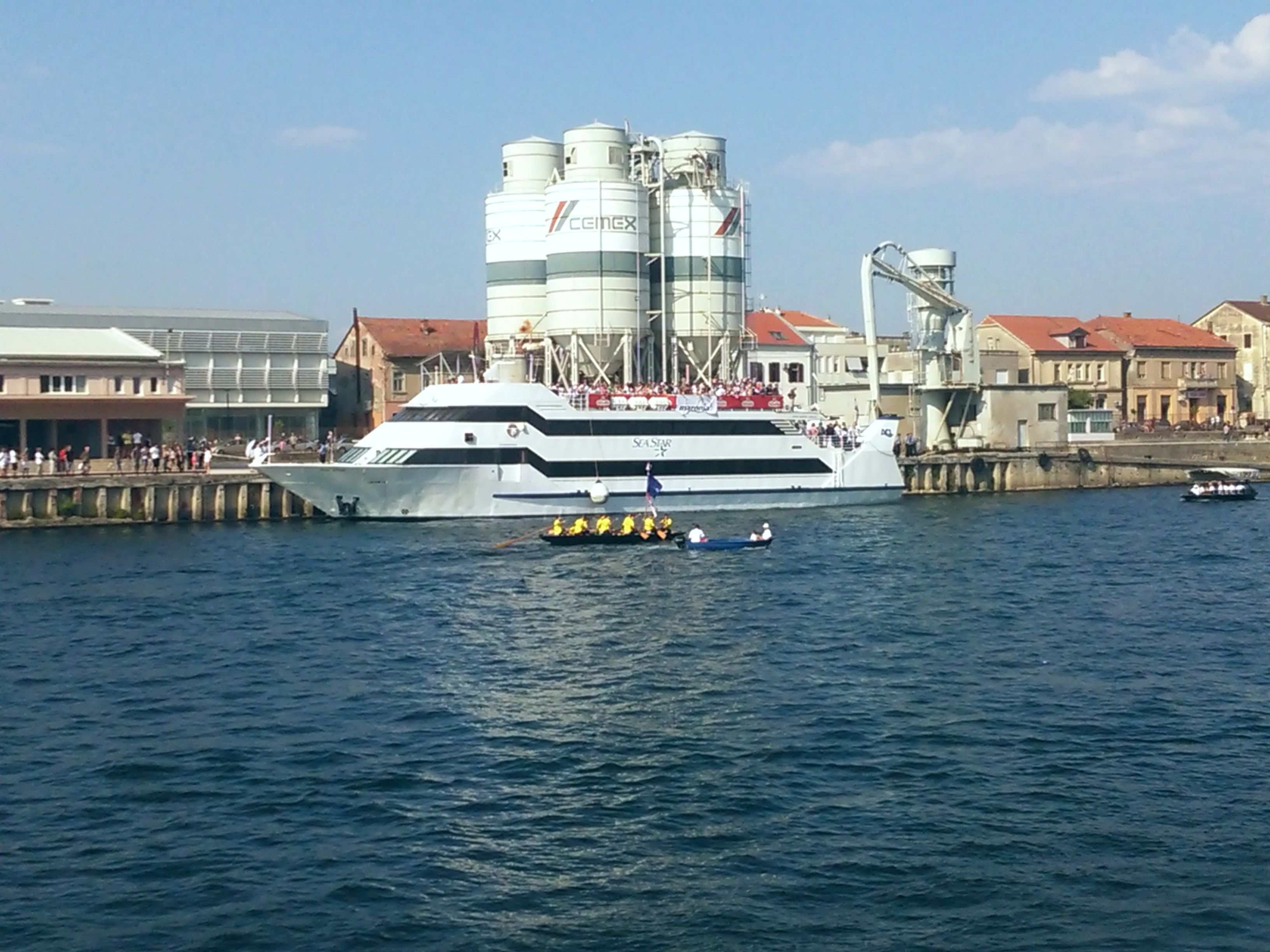 Brod Seastar na startu Maratona (Maraton lađa 2015.)